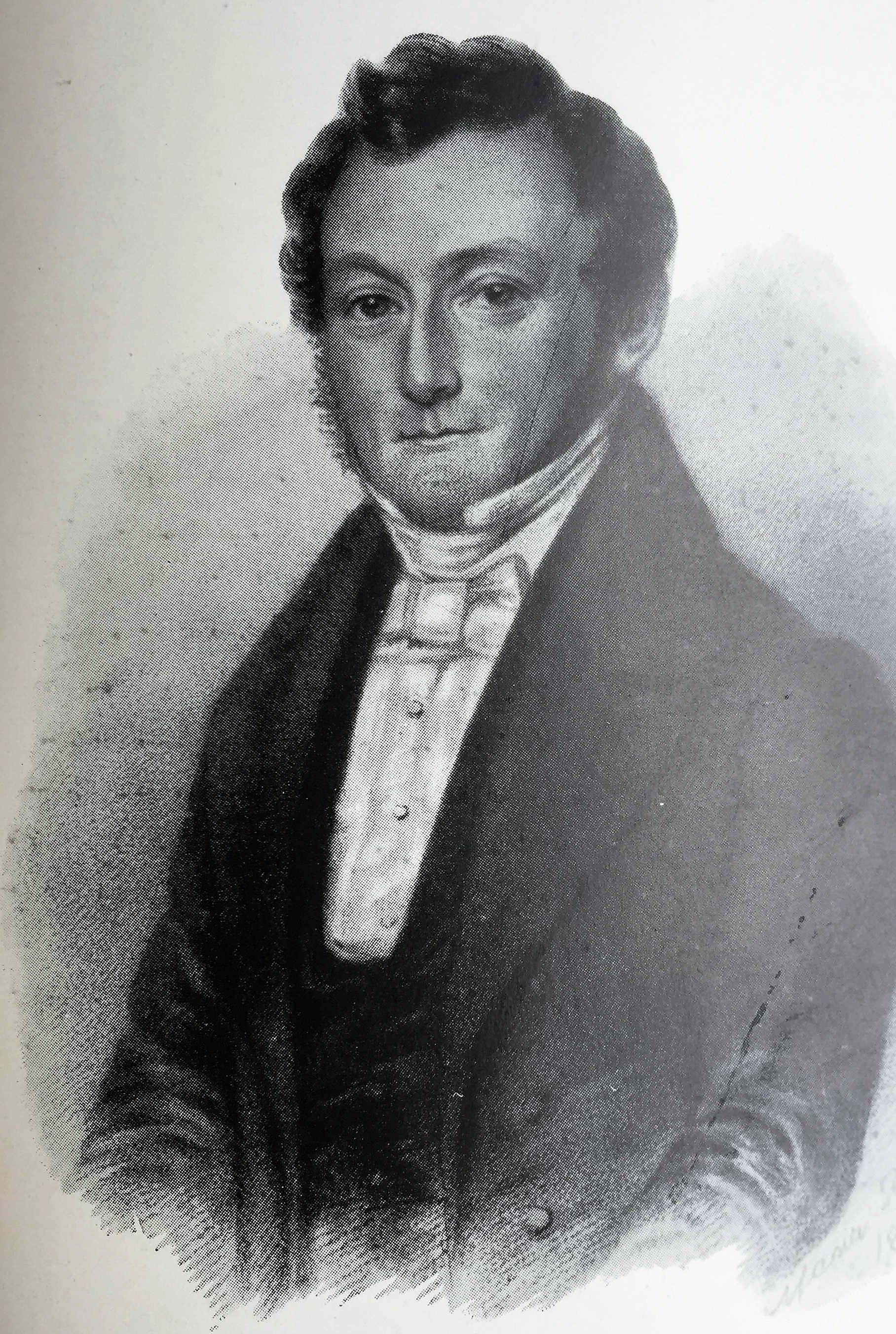 Pennteckning av Nils Anders Berg